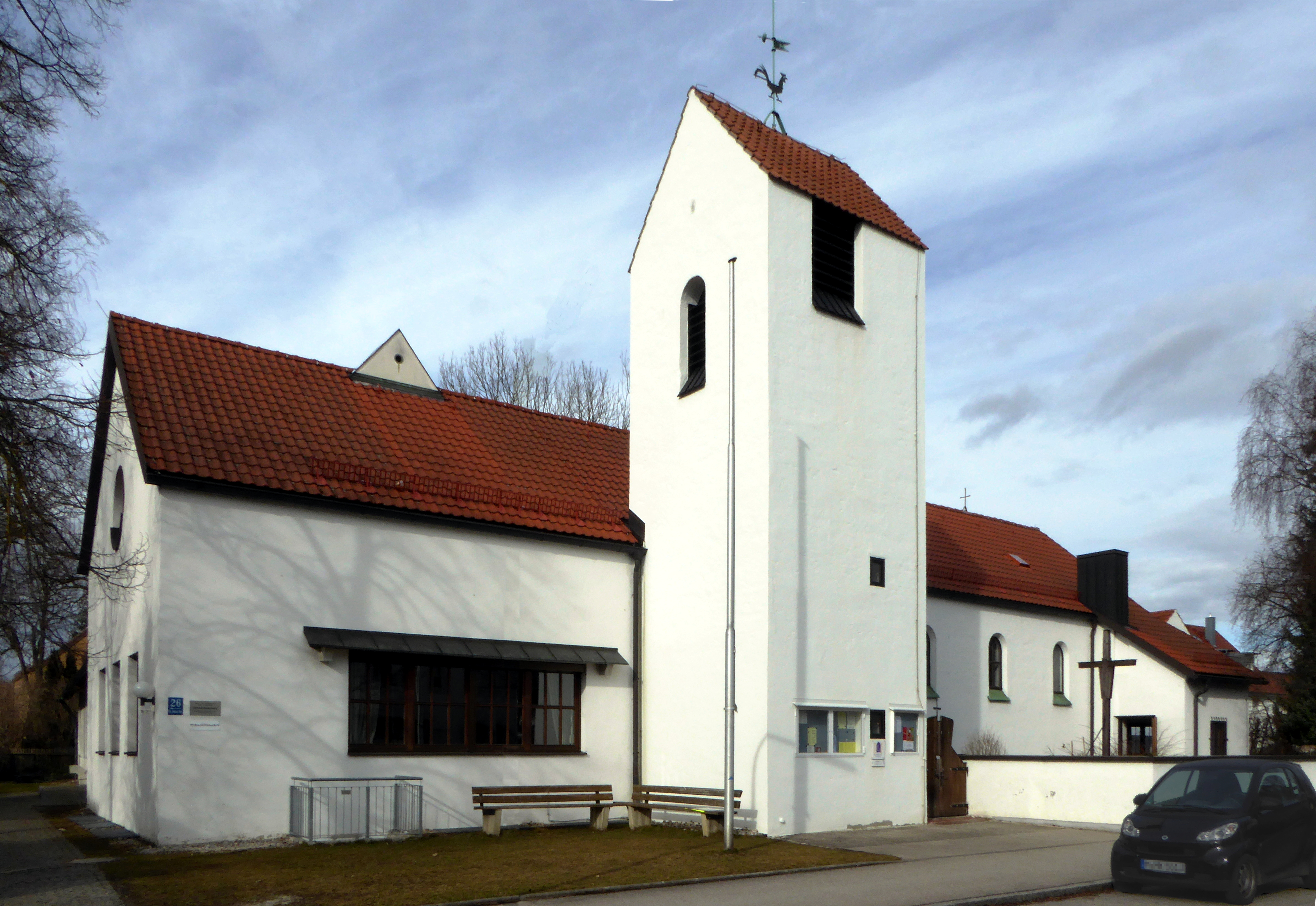 München-Allach, Epiphaniaskirche, Südseite.